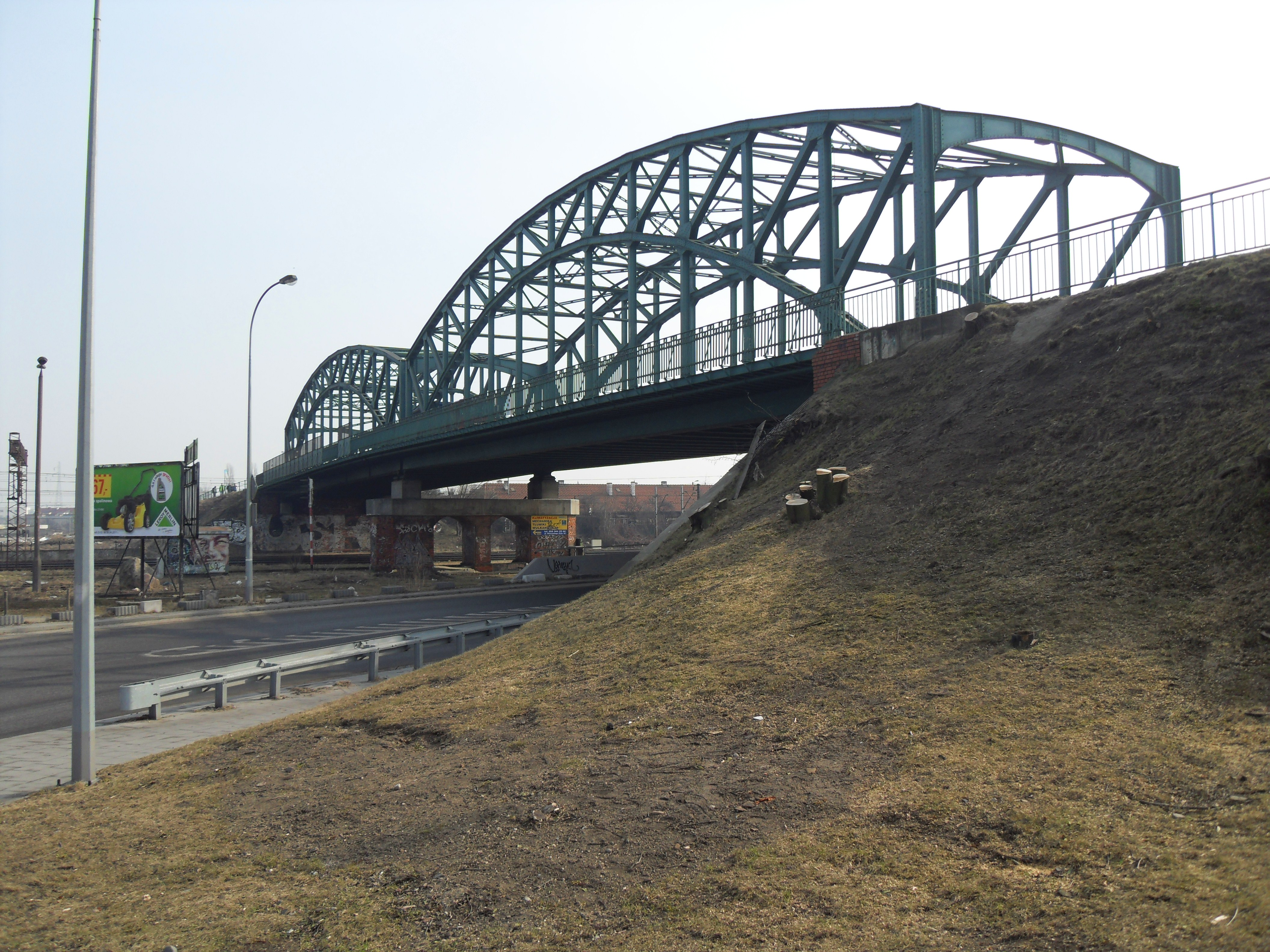 Wiadukt w ciągu ul. Kościuszki, w Gdańsku Wrzeszczu.